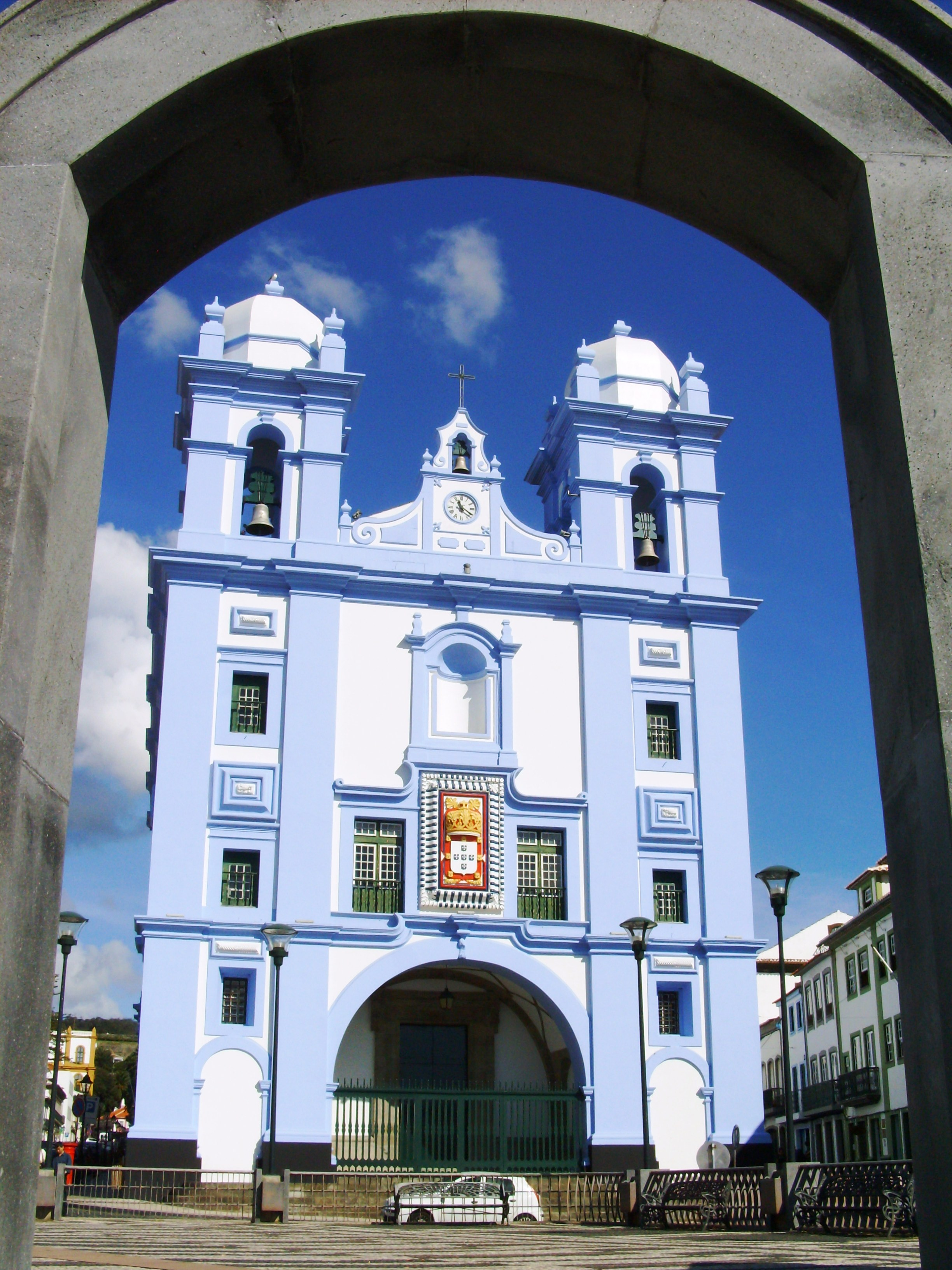 Portas da Cidade, Angra do Heroísmo, ilha Terceira, Açores: Igreja da Misericórdia.